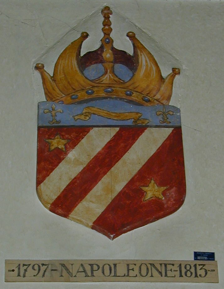 Stemma indicante la parentesi napoleonica in Cadore - ripreso dal muro della Magnifica Comunità di Cadore a Pieve di Cadore.